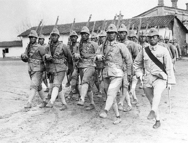 奉天派・張宗昌の直魯連軍兵士ら。